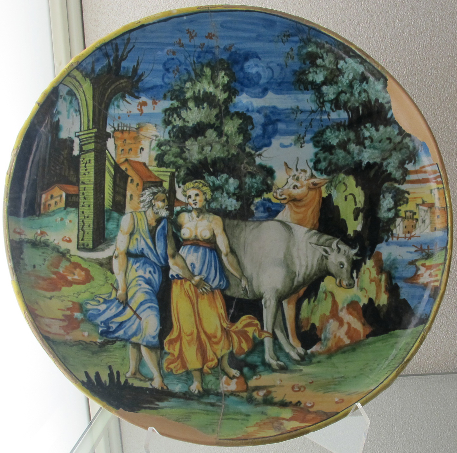 Museo Nazionale d'Arte Medievale e Moderna - MIBAC This is a photo of a monument which is part of cultural heritage of Italy.